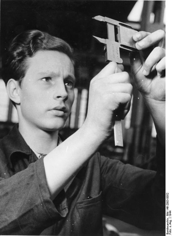 Bild Nr. A 127 191 Vom Kriegsberufswettkampf 1944: 50.000 Jungen und Mädel stehen im Gauwettkampf. Bei der fortlaufenden Prüfung des zu bearbeitenden Werkstückes, das im Rahmen der gestellten berufspraktischen Aufgaben von den Wettkampfteilnehmern anzufertigen ist.